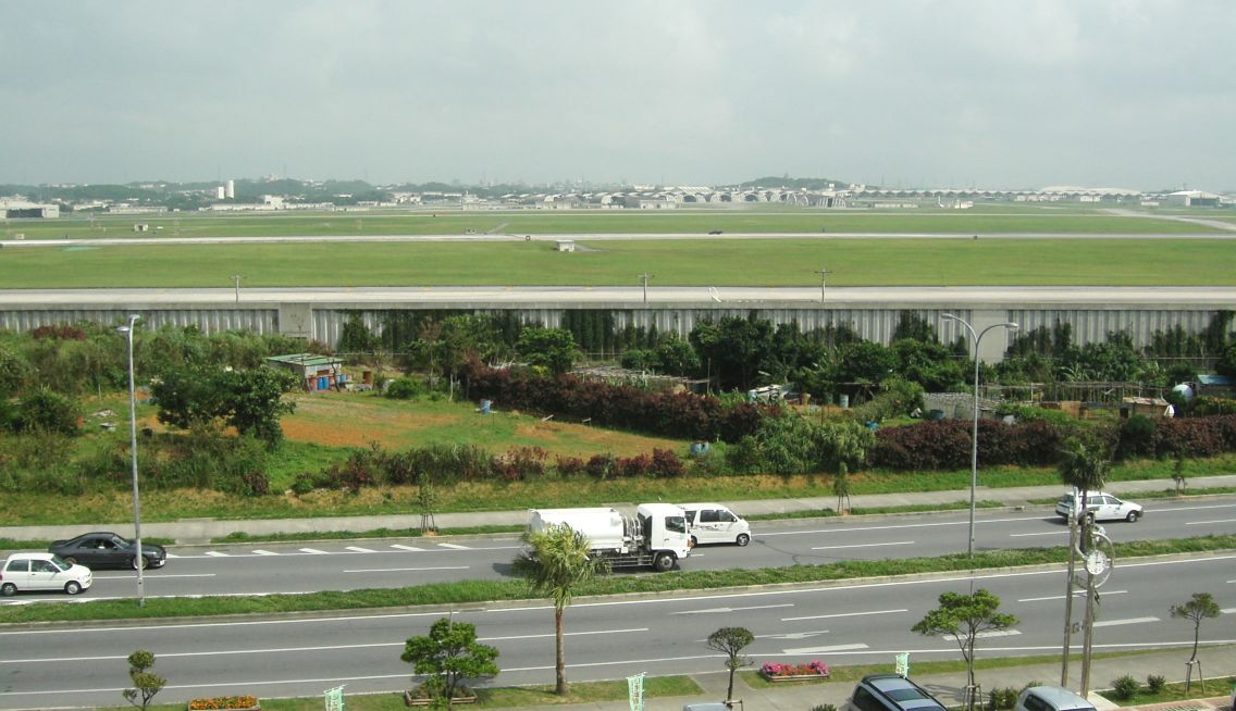 Kadena Air Base, Okinawa, Japan.(道の駅かでな展望台から撮影した嘉手納飛行場)